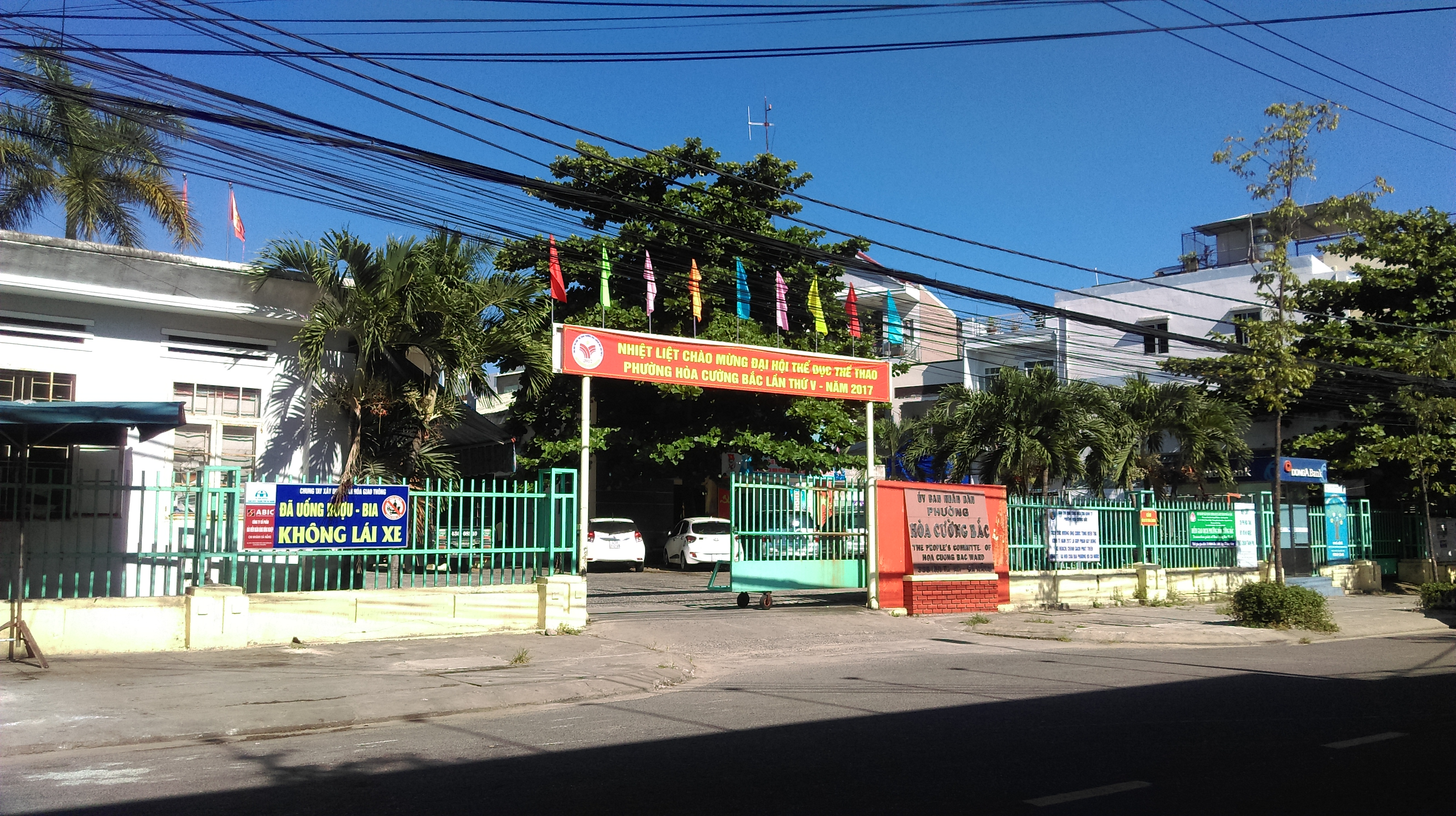 UBND phường Hòa Cường Bắc, Hải Châu, Đà Nẵng